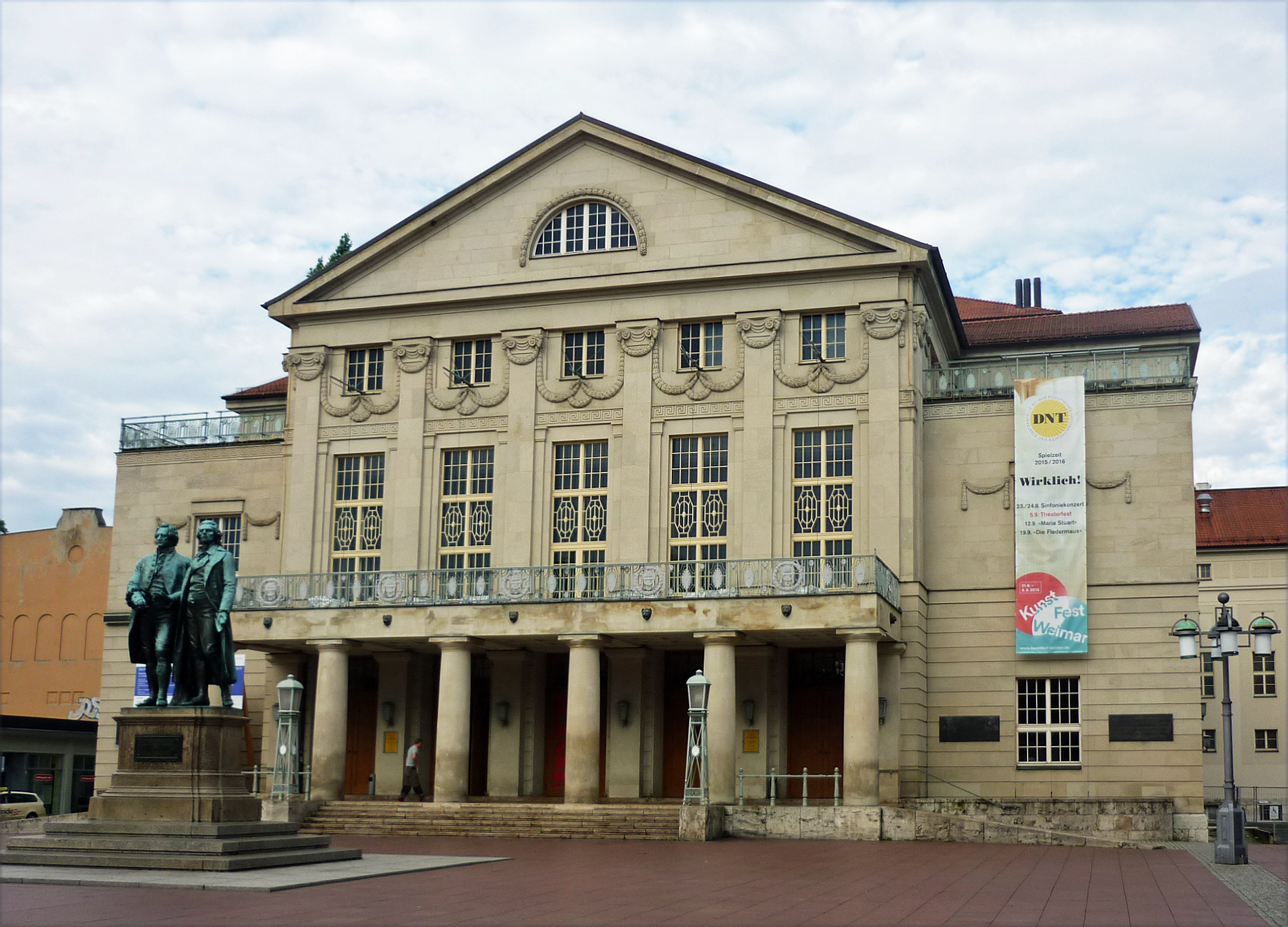 Deutsches Nationaltheater Weimar